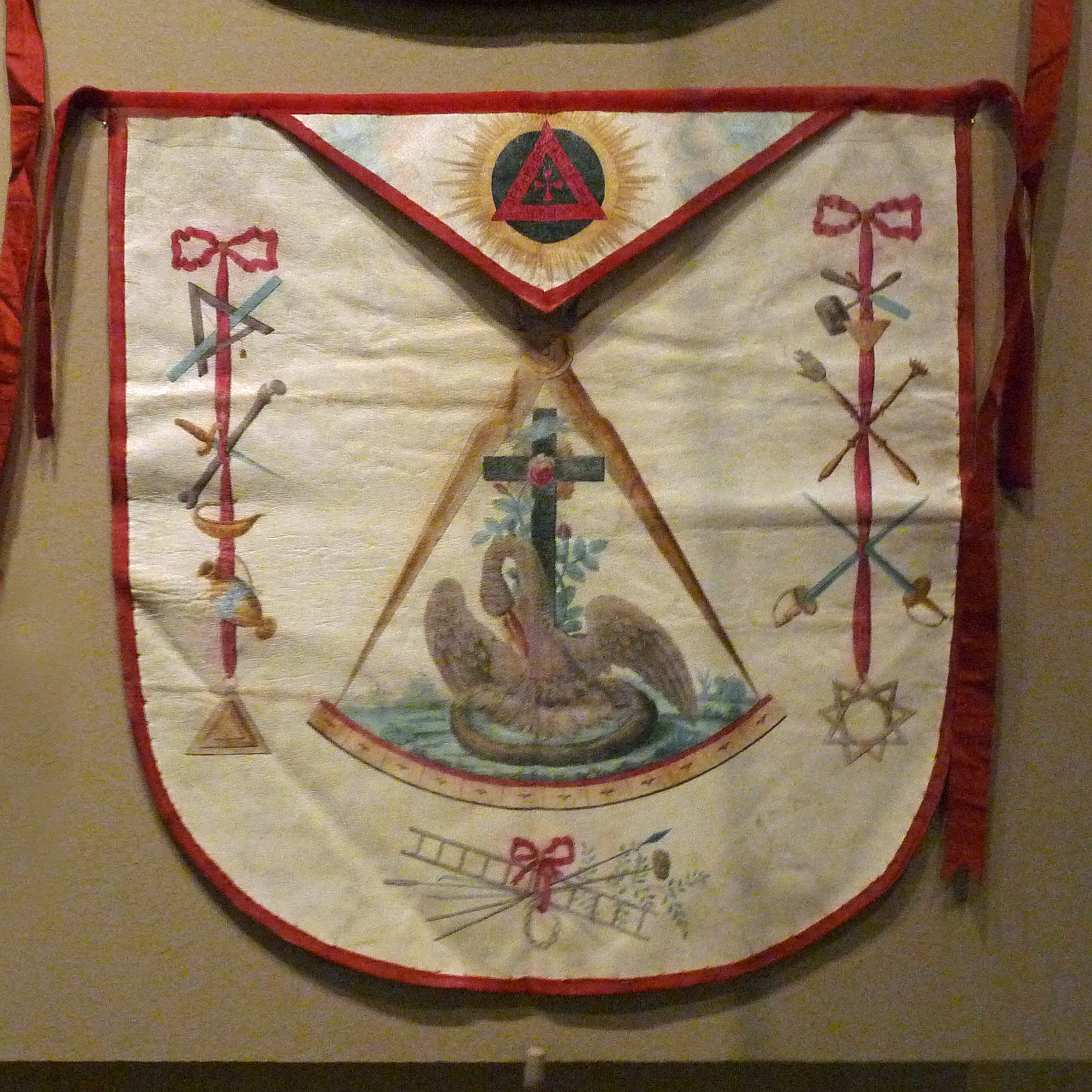 Franc-maçonnerie à Strasbourg : tablier de Haut grade